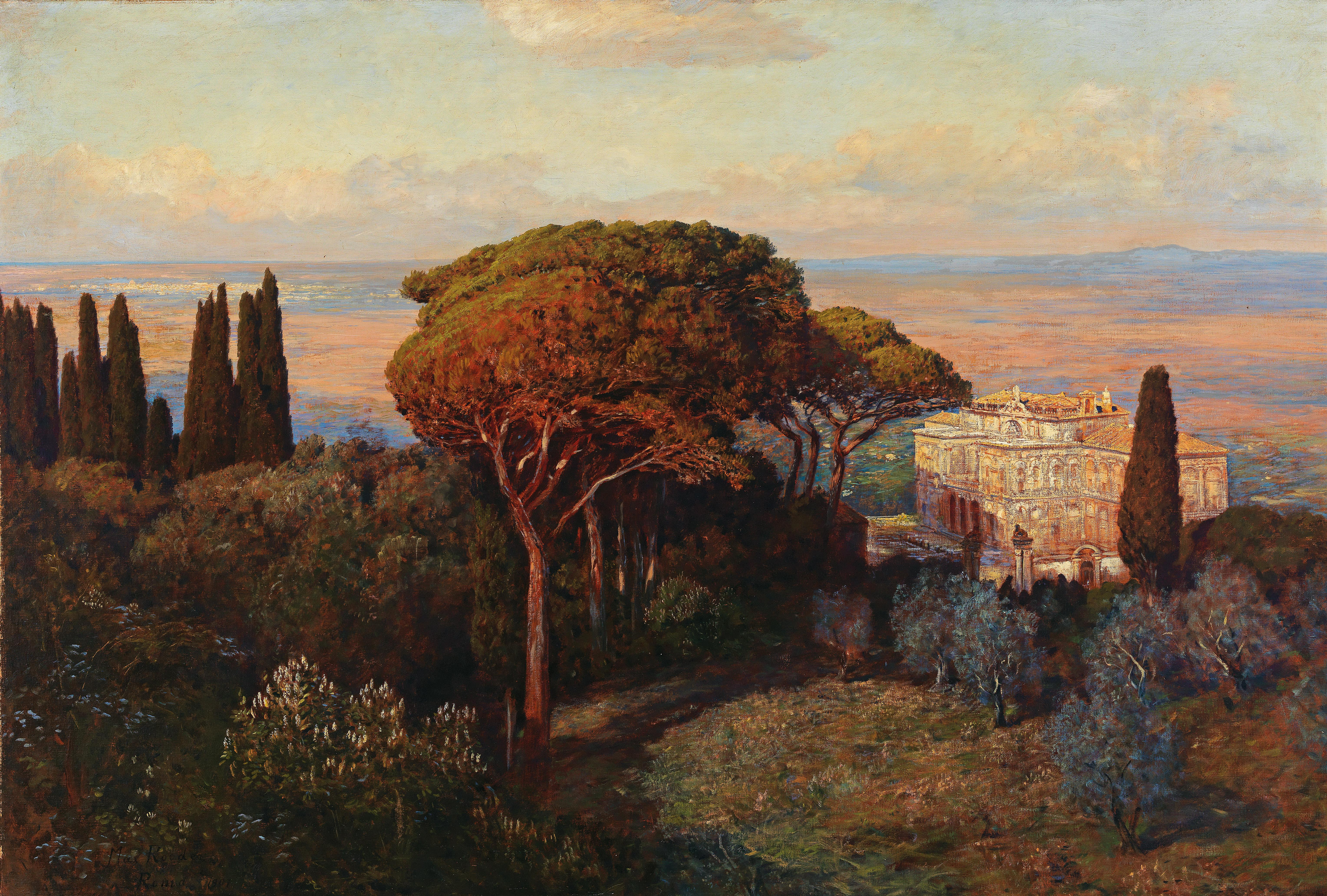 Blick auf die Villa Falconieri (Frascati), bezeichnet "Max Roeder Roma 1907", Öl auf Leinwand, 115.5 x 172 cm